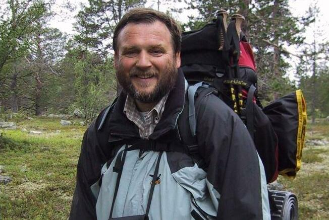 Der Schriftsteller Harald Grill unterwegs